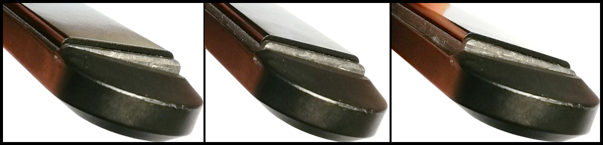 Демонстрация подвижности "плавающих" пластин выпрямителя для волос.